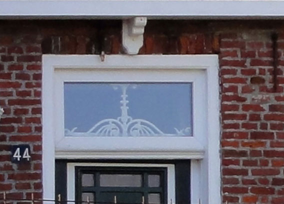 Detail - levensboom in het bovenlicht van de deur - van de woning aan De Oere 44 in Moddergat